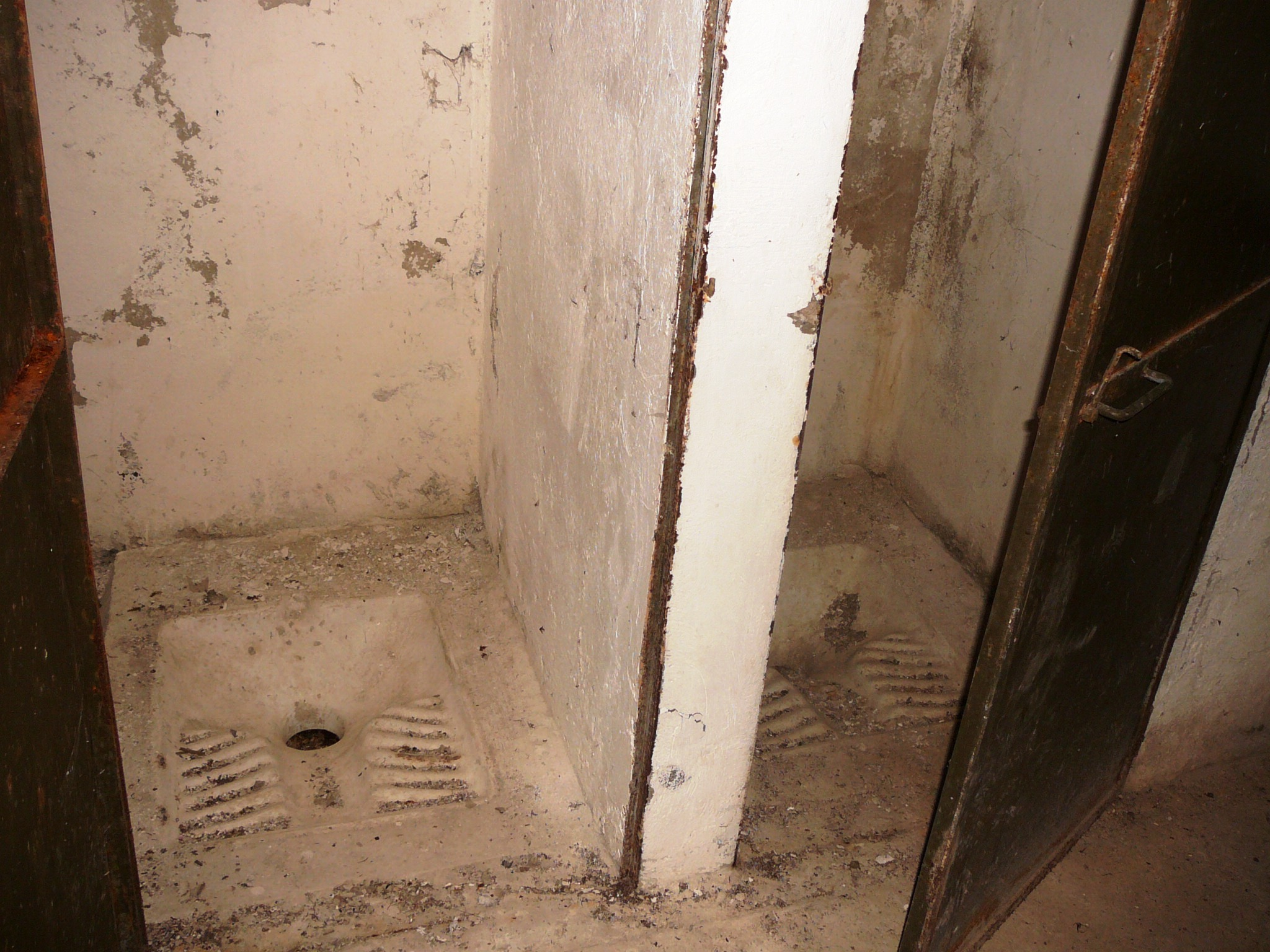 Bagno turco all'interno dell'opera 15, sbarramento Mules